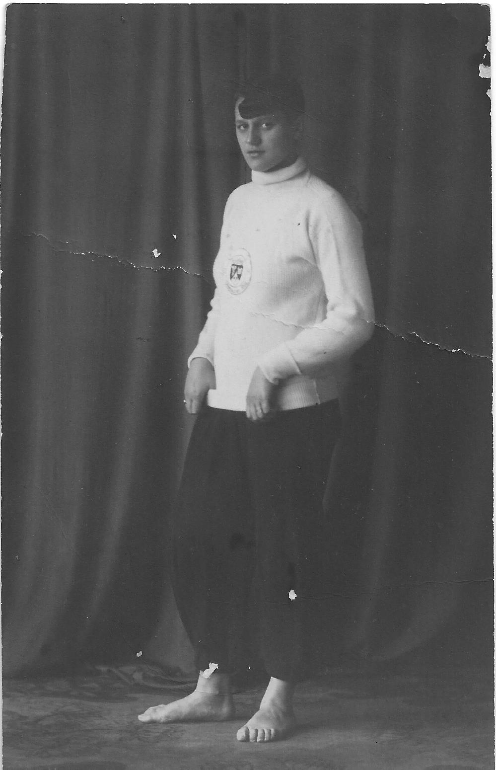 Reni Küppers-Erkens, Schwimmerin